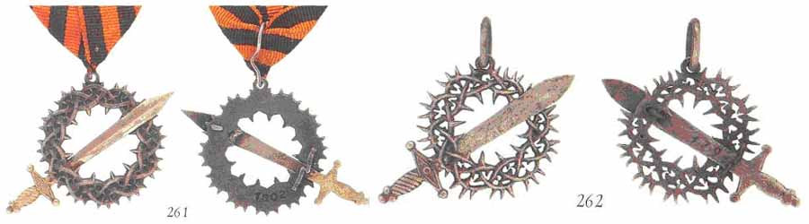 Знак отличия Первого Кубанского похода. 261. Знак отличия Первого Кубанского похода, № 1802 — рядового, добровольца Ф.Шолтеса. 262. Знак отличия Первого Кубанского похода, № 1791 — рядового, добровольца Ф.Вейлупена. Описание: Терновый венец, пронзенный мечом. Изготовлен из серебра. Диаметр — 32 мм. Носился на Георгиевской ленте. Изготовлен в Праге.